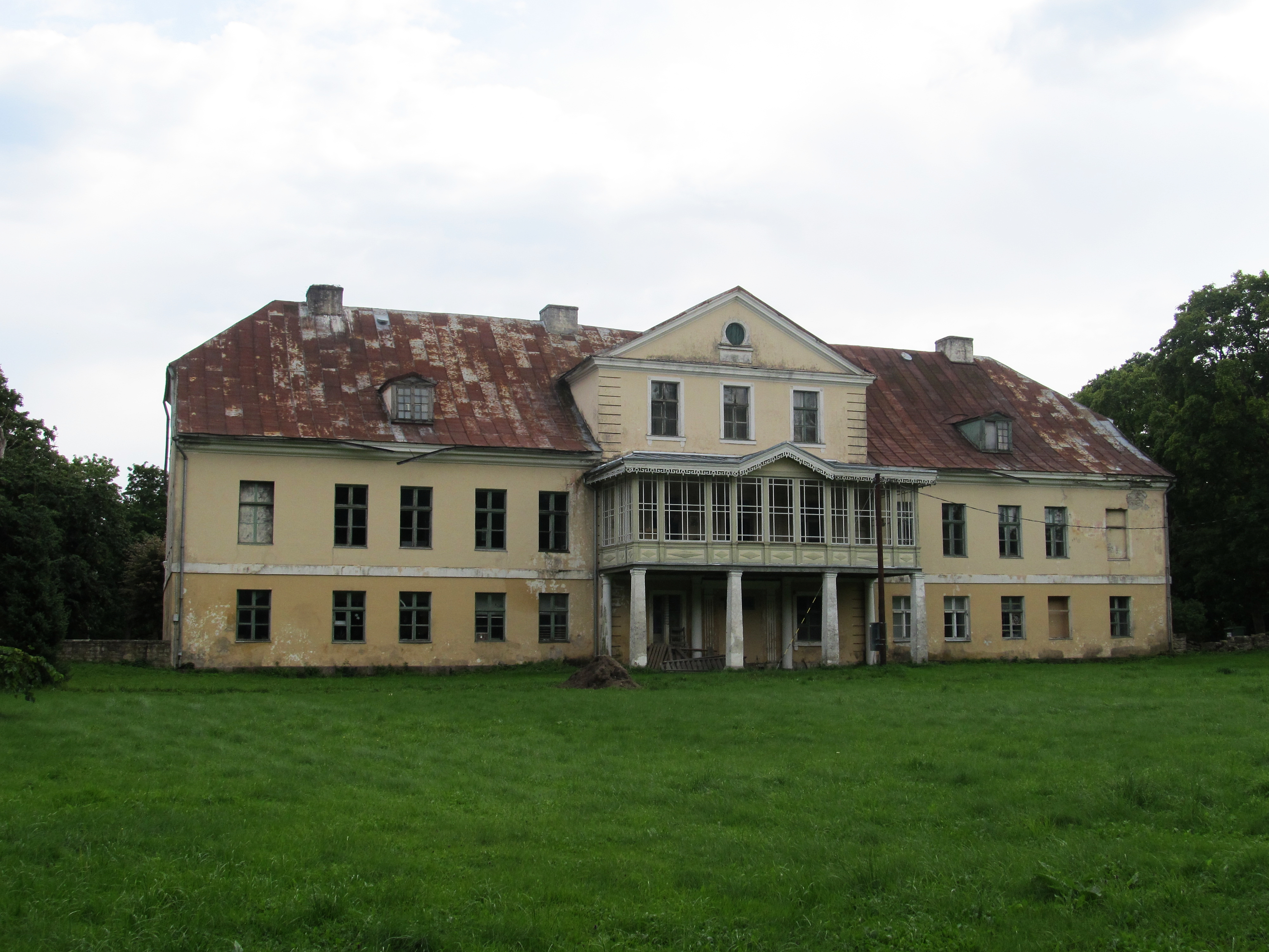 Vaade Vatla mõisa peahoone tagaküljele